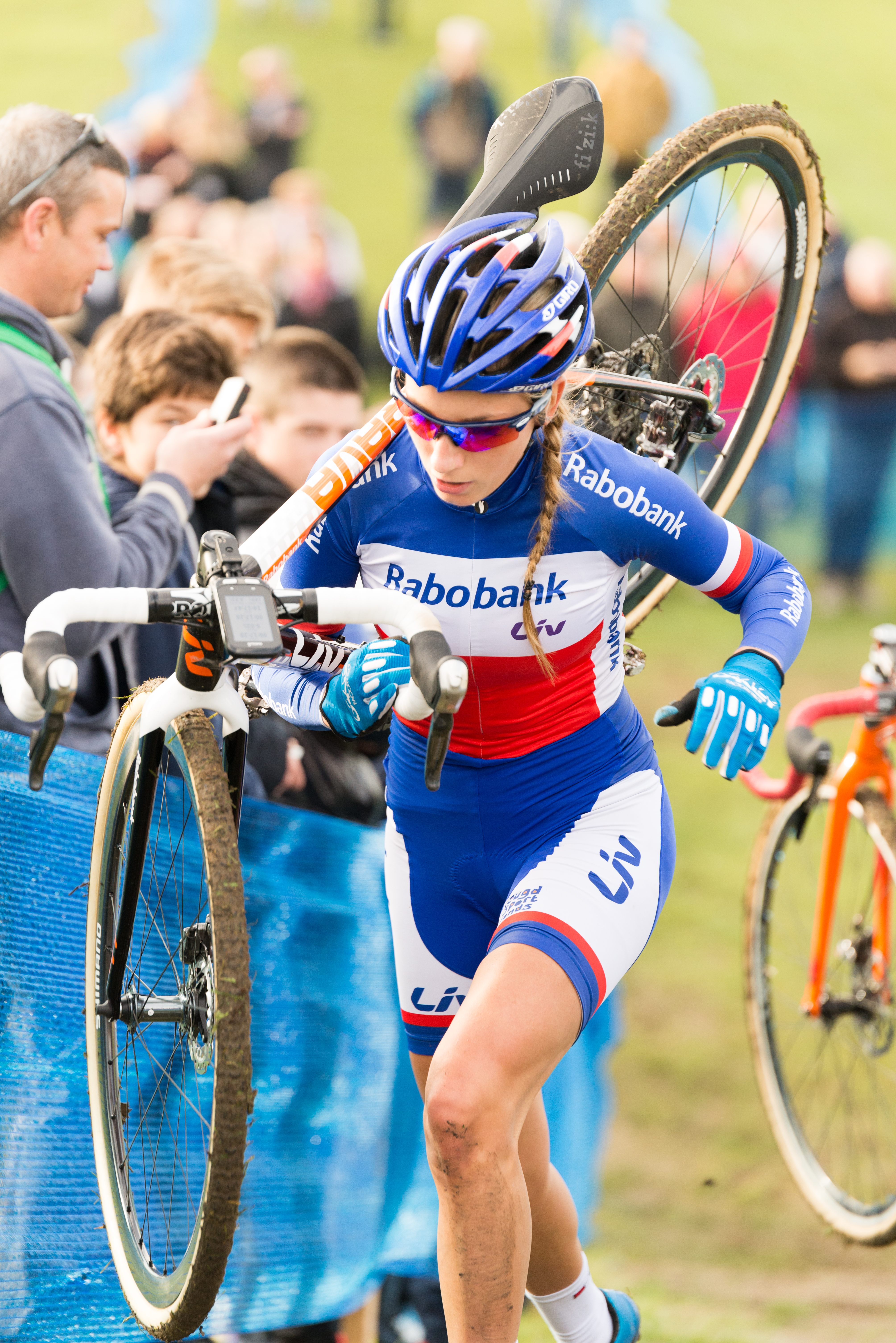 Pauline Ferrand-Prévot gagnante de l'épreuve féminine du 27ème cyclo-cross international de Dijon (Côte d'Or, France).